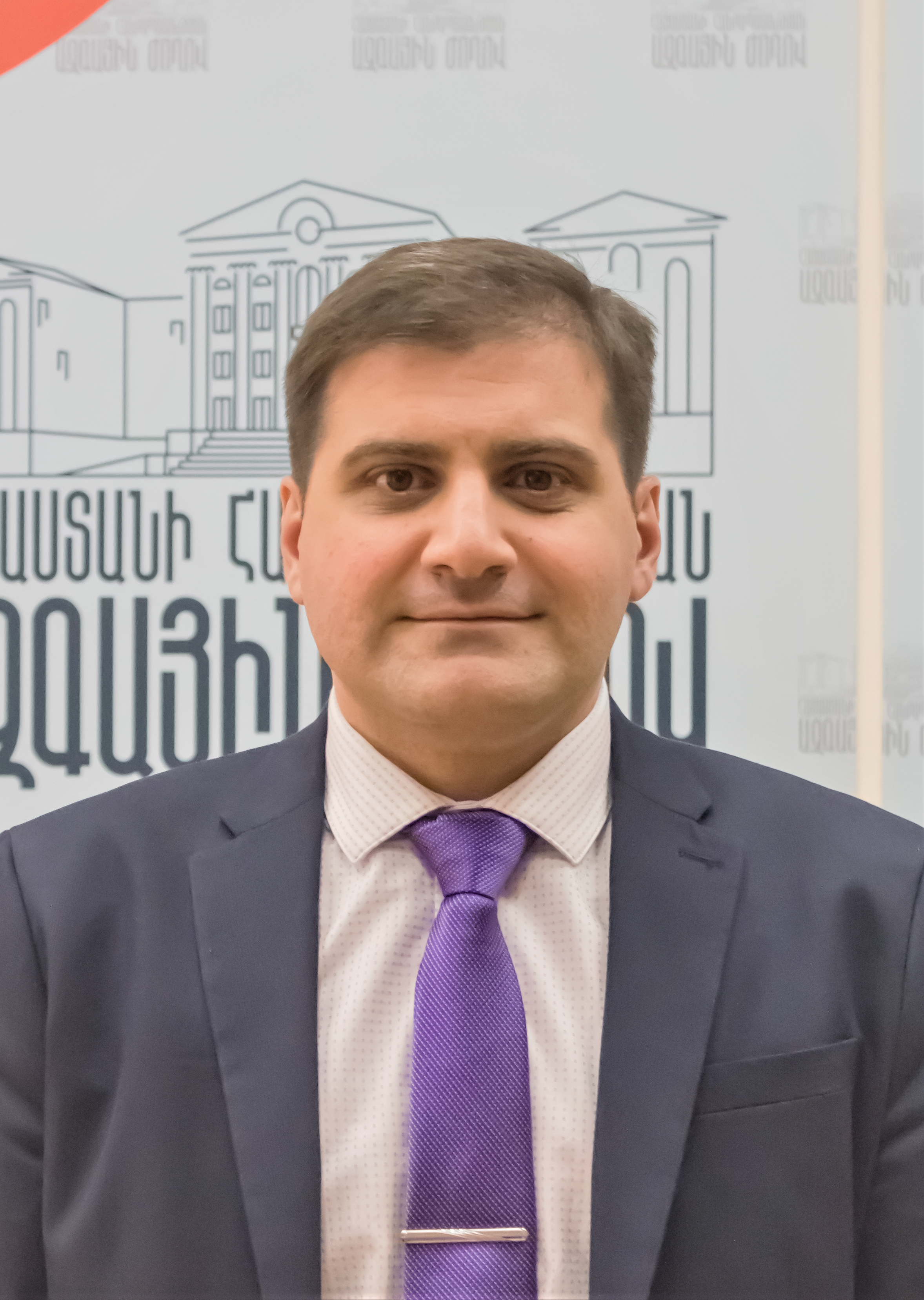 Արման Բաբաջանյան (ԼՀԿ)